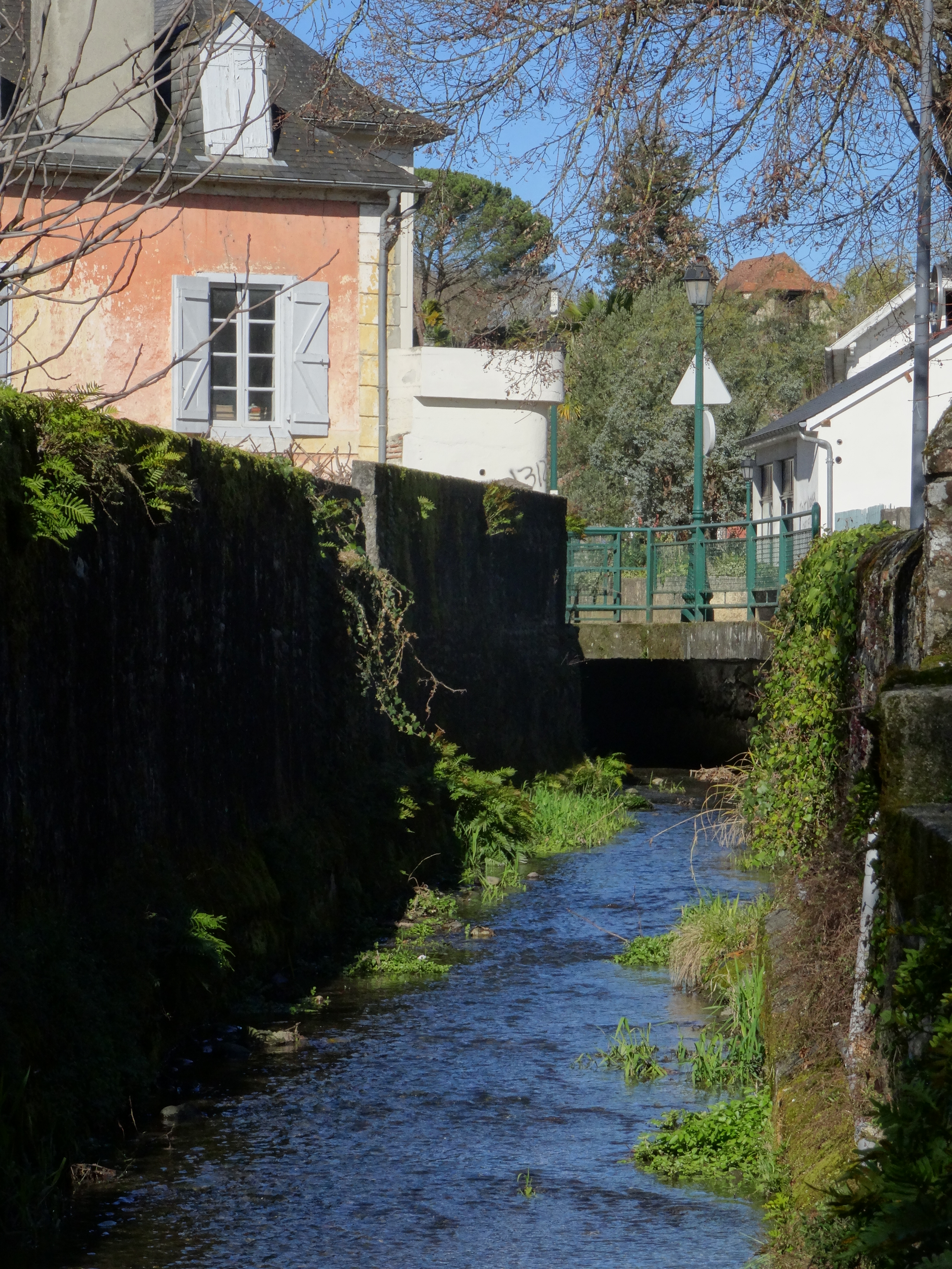 Le ruisseau Lescourre à Lescar